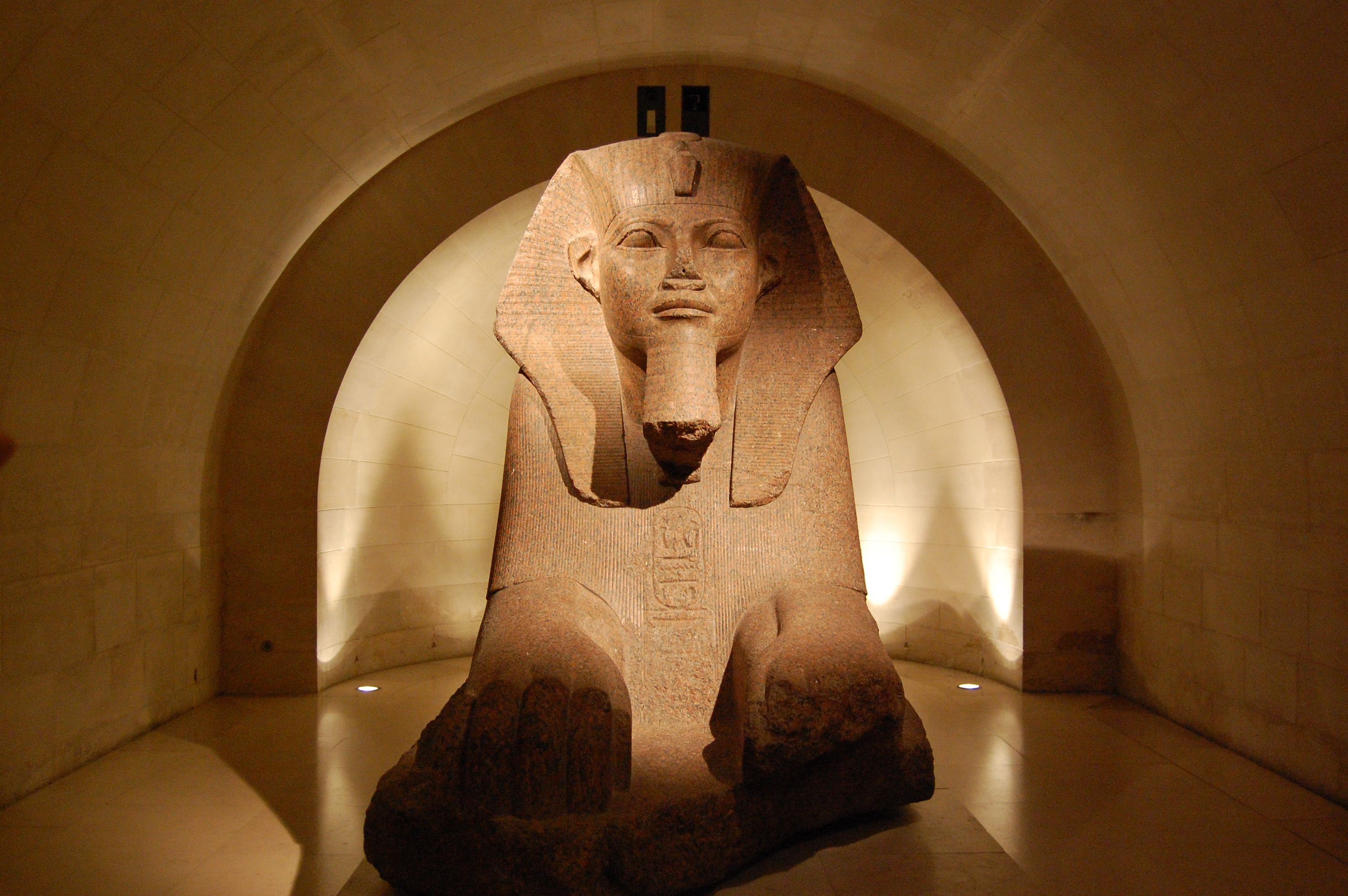 An Exhibit in the Musee du Louvre